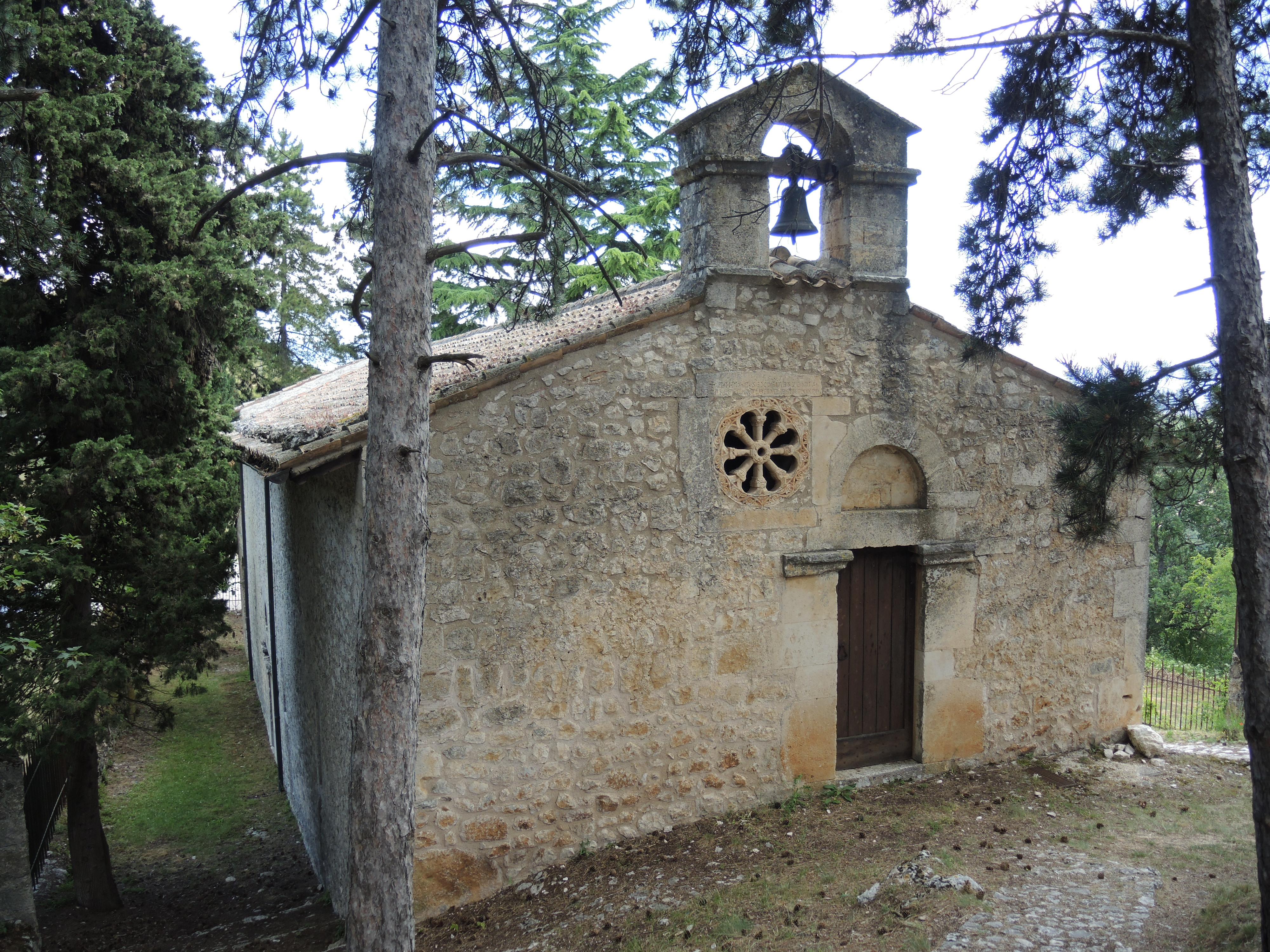 Bominaco: Oratorio di San Pellegrino